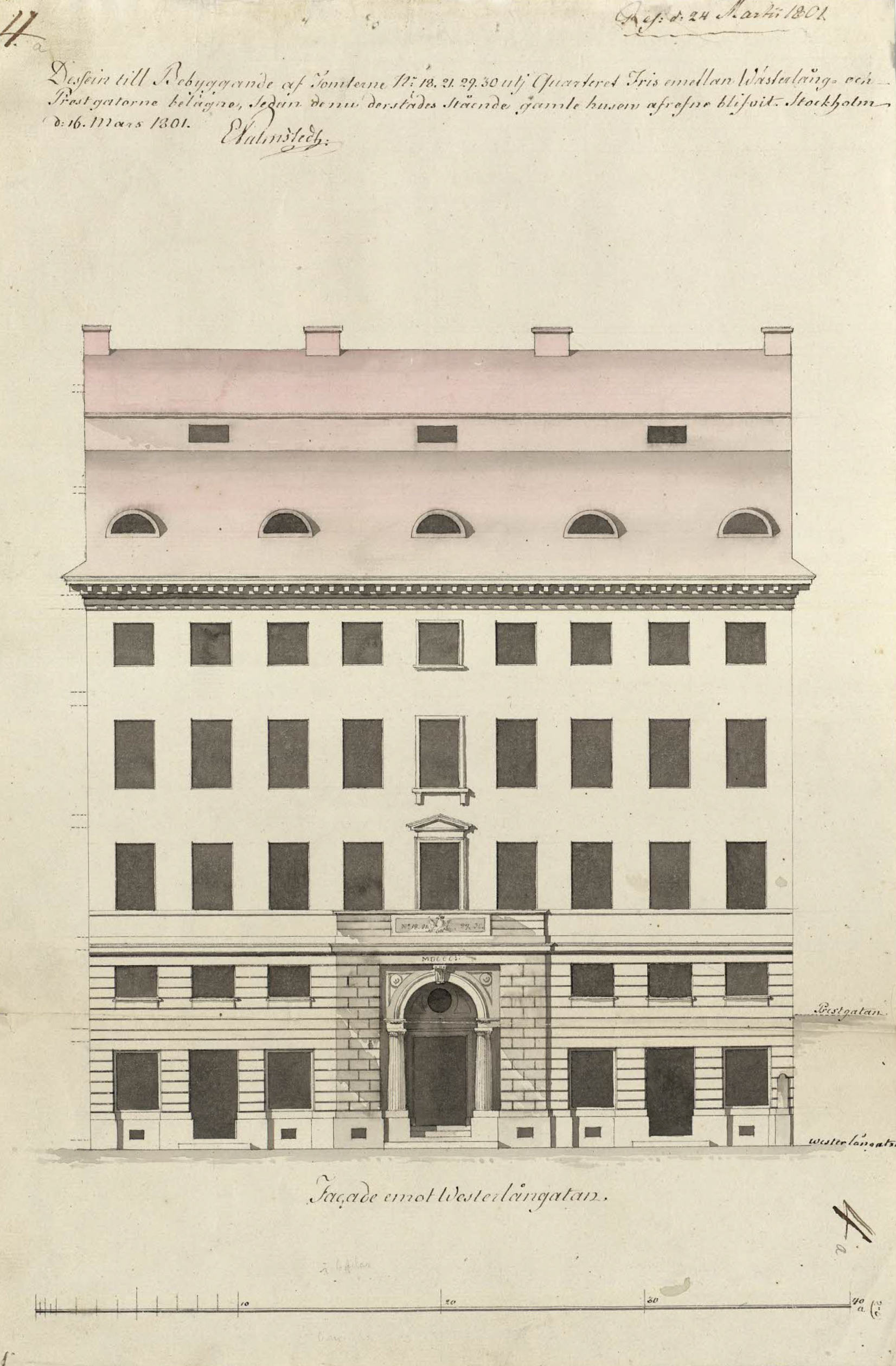 Palmstedts hus, fasad mot Västerlånggatan, Gamla stan